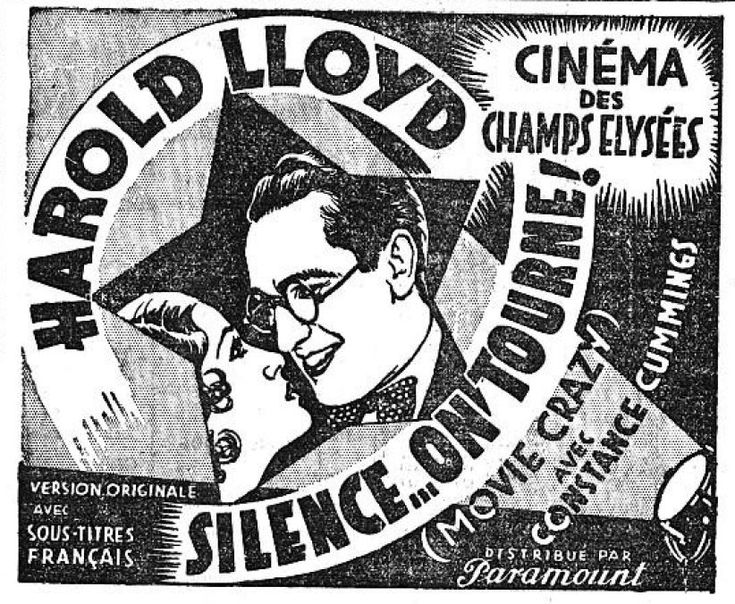 Publicité pour le film Silence on tourne au cinéma des Champs Elysées parue dans le Figaro n°332 (27 novembre 1932), page 7.